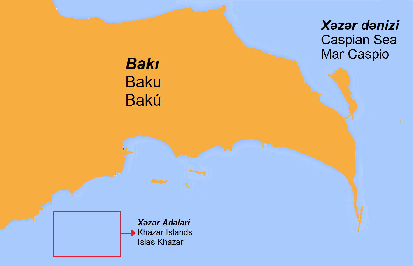 Islas Khazar